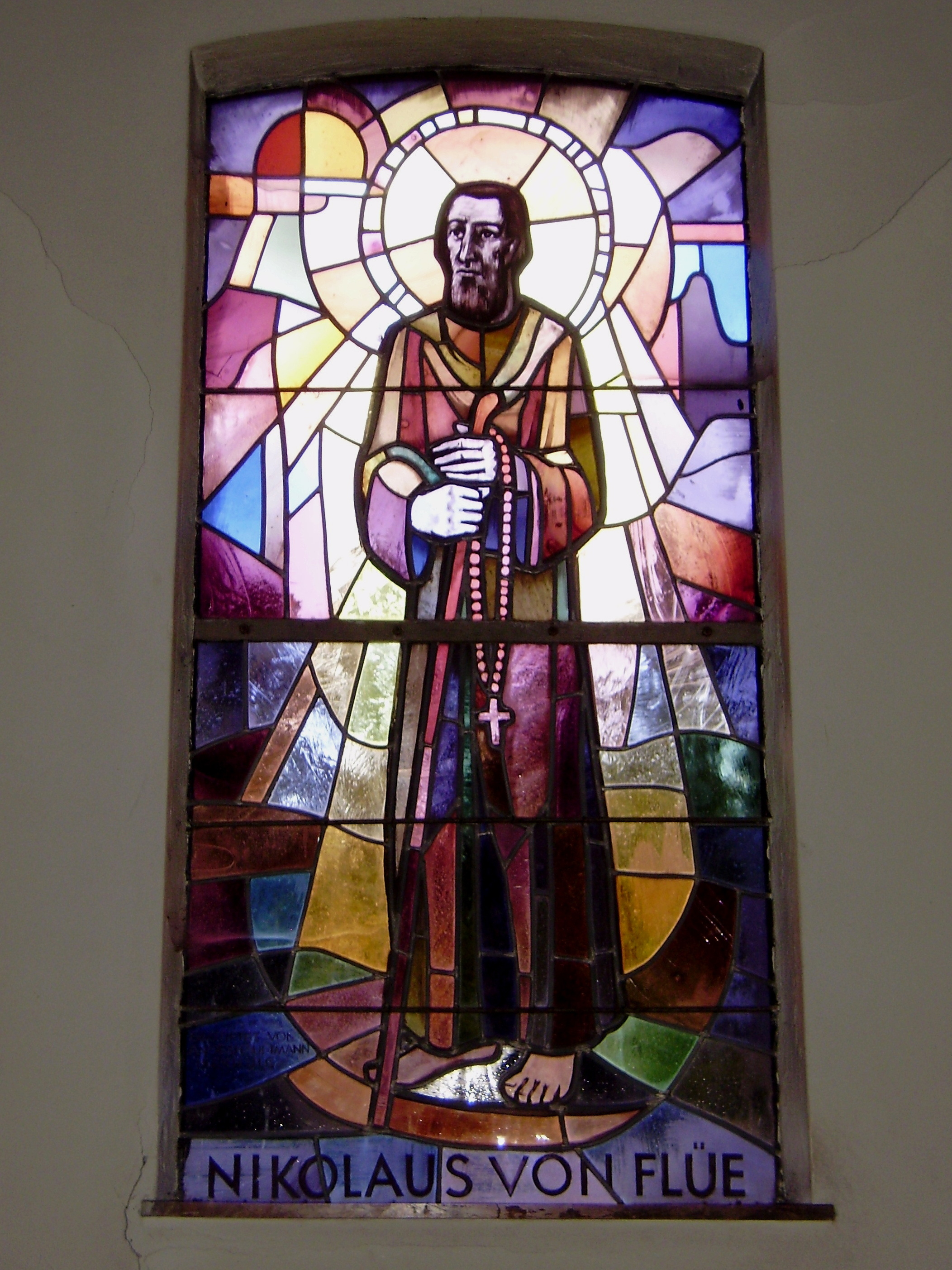 Seitenfenster Nikolaus von der Flue